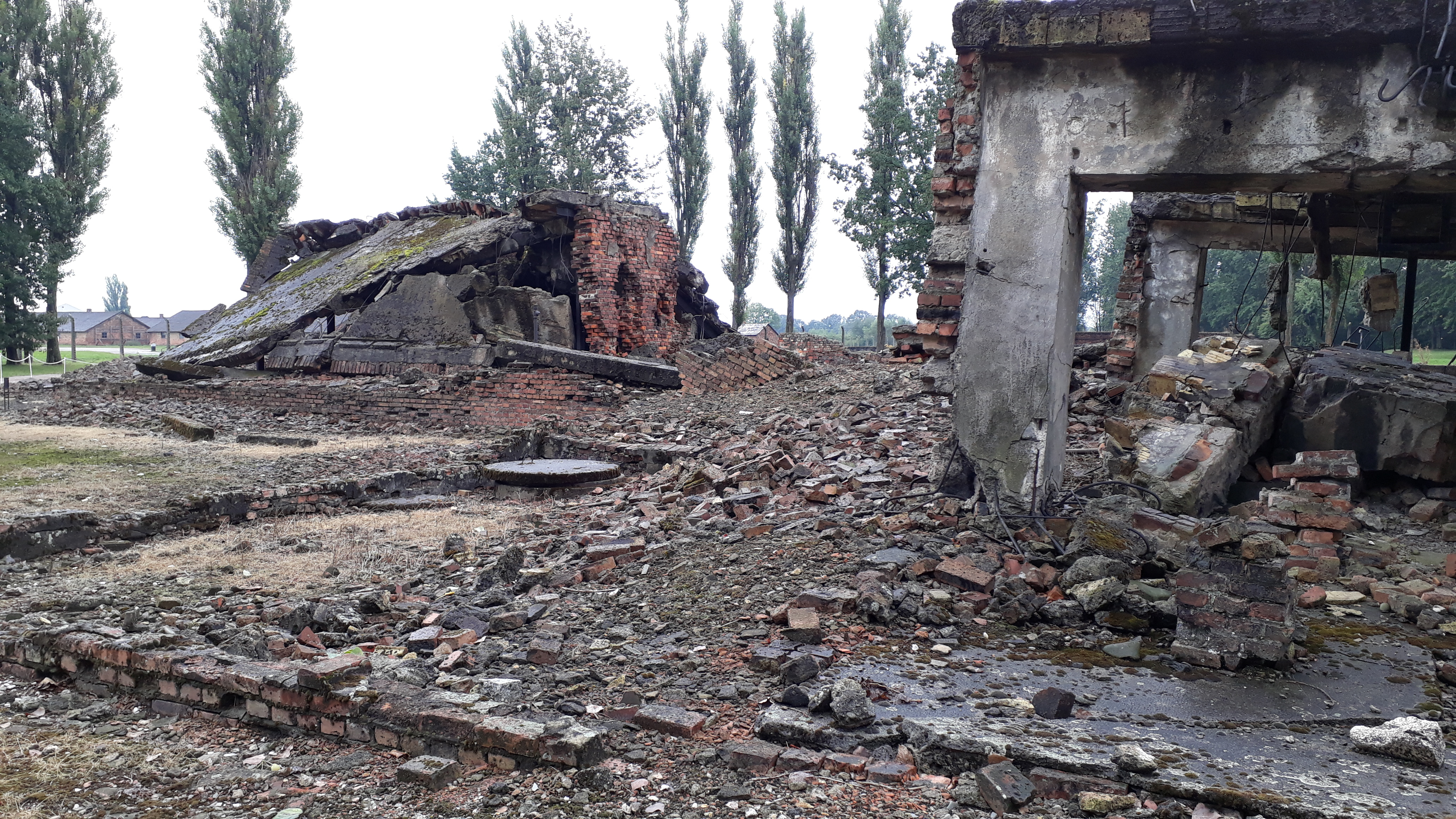 Das von der SS gesprengte Krematorium 2 in Auschwitz-Birkenau im Jahre 2018